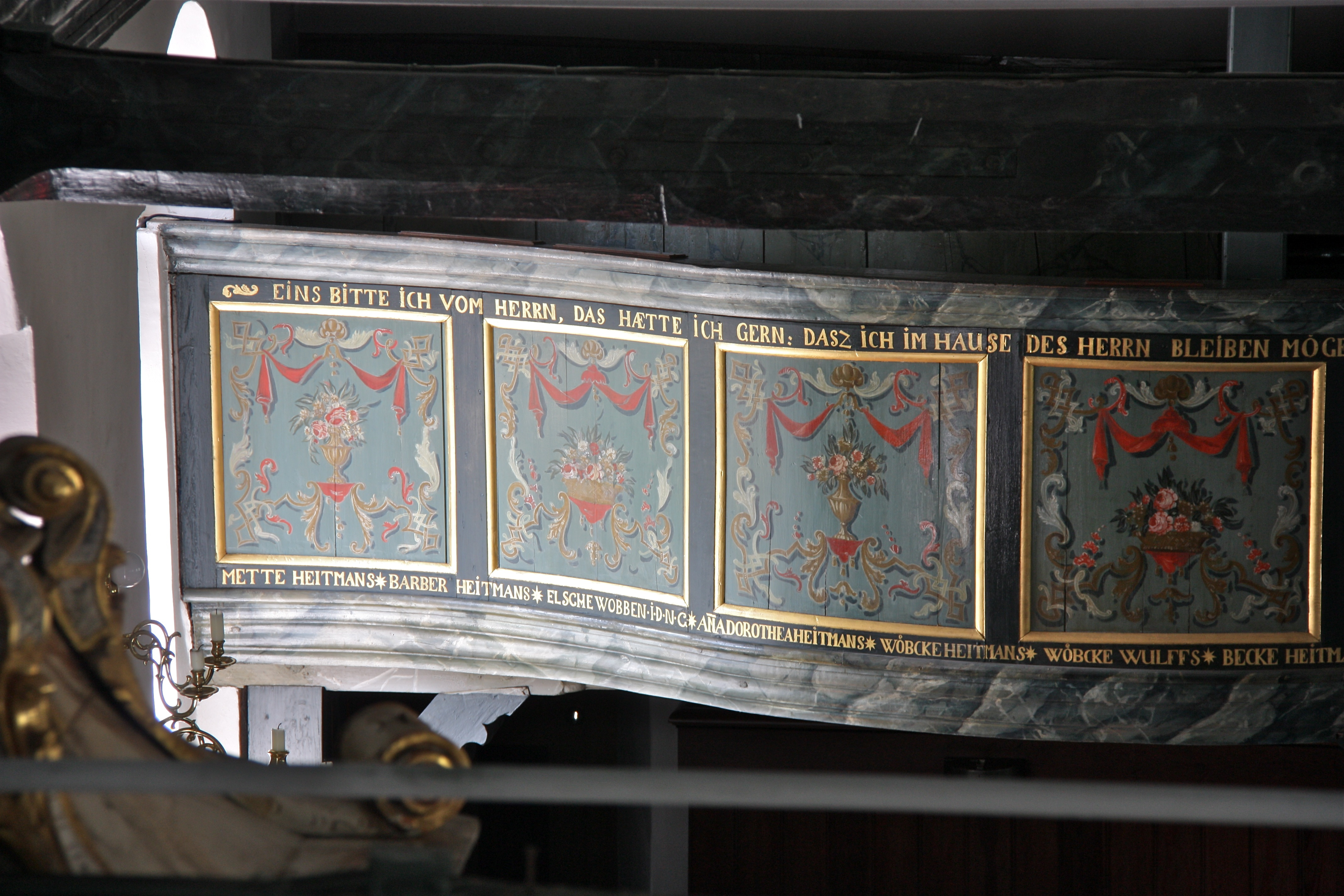 Hamburg, Altengamme, Kirche St. Nicolai, Malerei an der Westempore This is a photograph of an architectural monument.